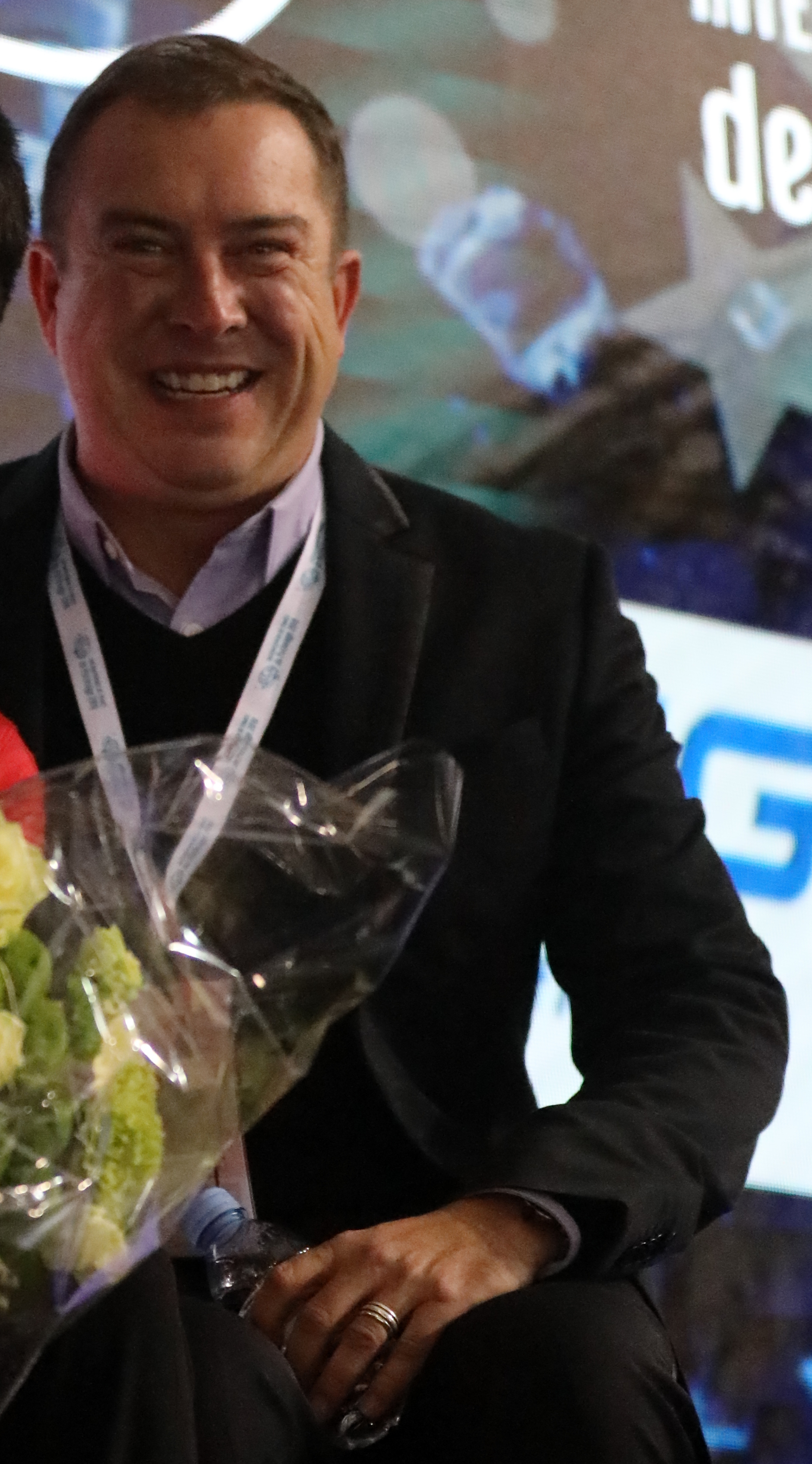 Tomoki Hiwatashi au Kiss&cry après le programme libre aux Internationaux de France 2019.